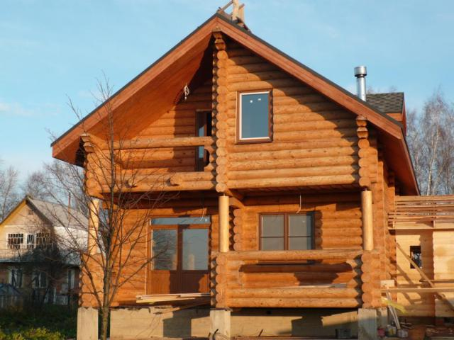 Фотография дома из оцилиндрованного бревна